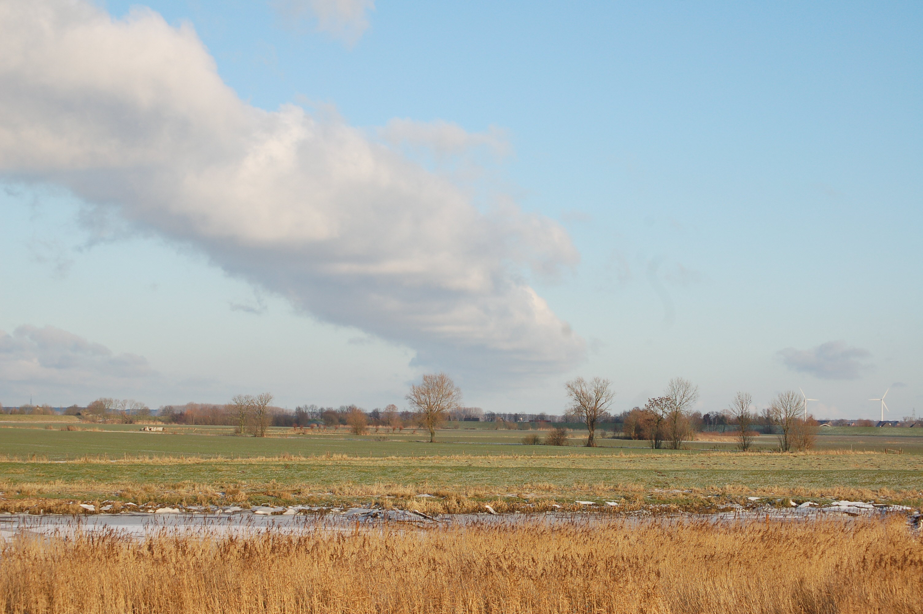 Blick vom Pinnaudeich in die Seestermüher Marsch im Winter 2008/09. Die Seestermüher Marsch gehört zum Kreis Pinneberg.